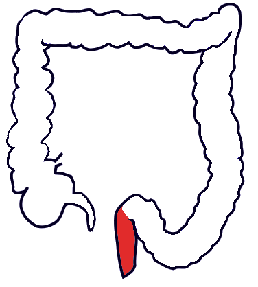 Retto (parte dell'intestino crasso)